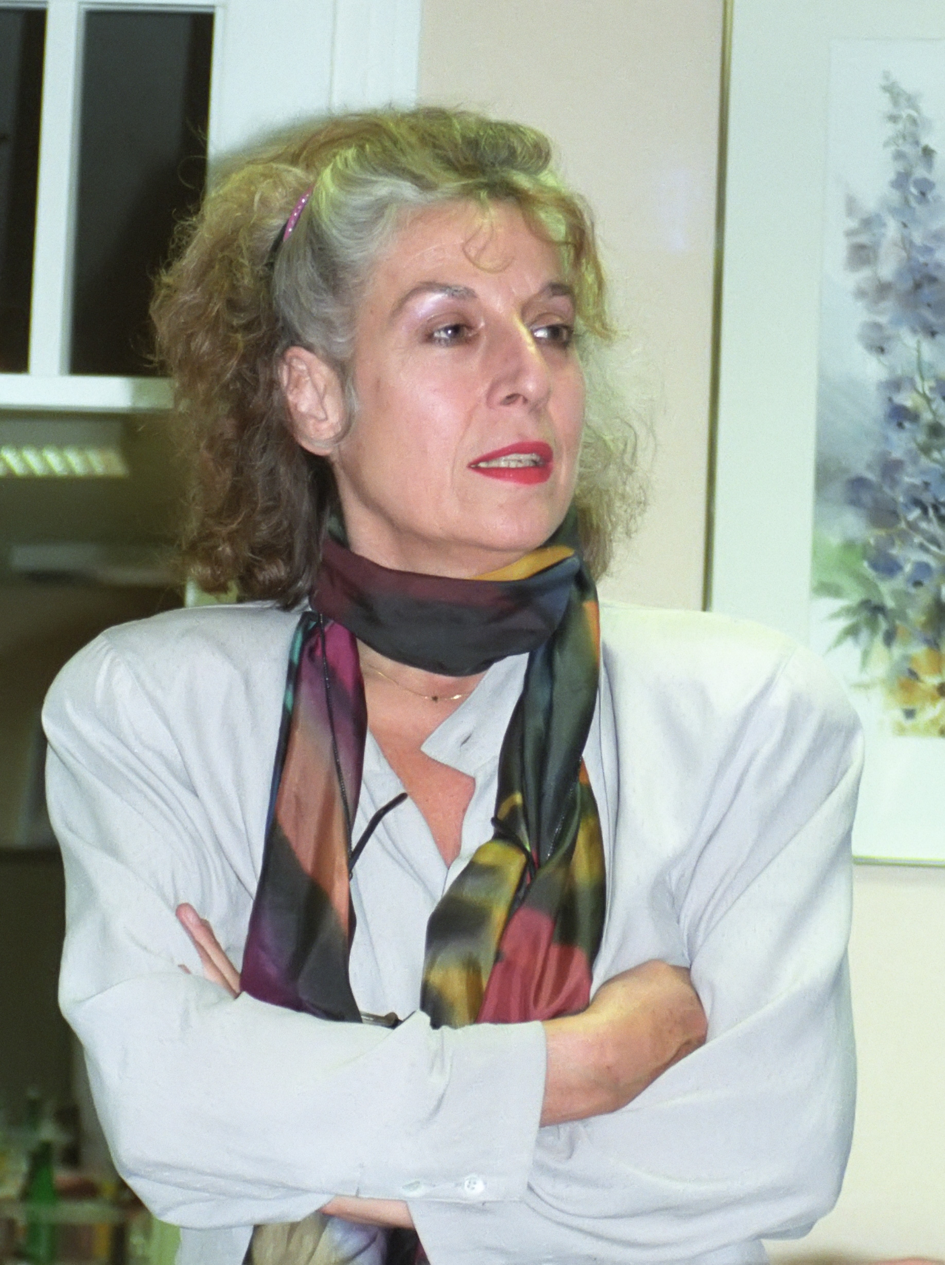 Porträt Lea Rosh